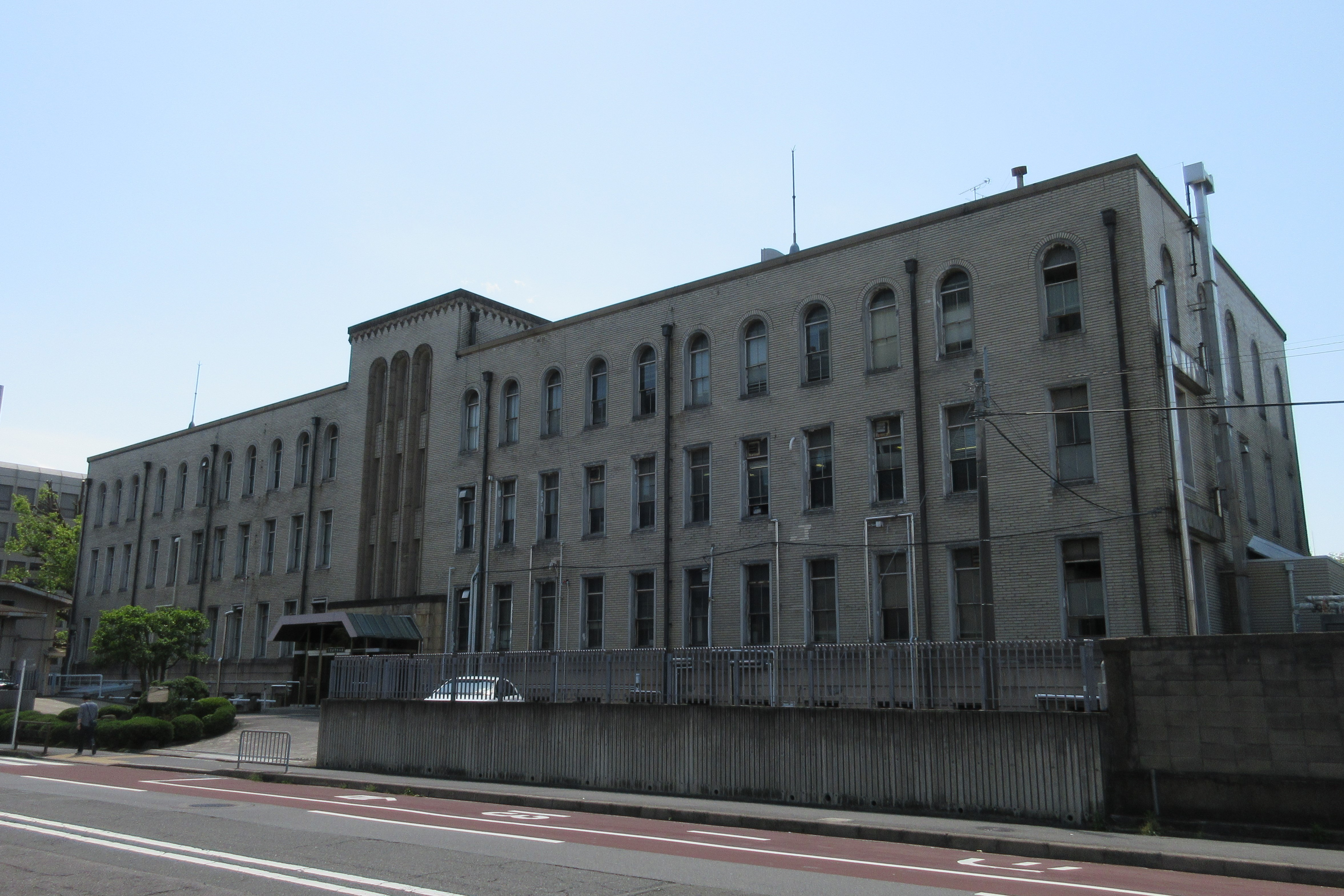 京都府警察本部